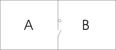 Максвелов демон - прост приказ Милија Јовичић